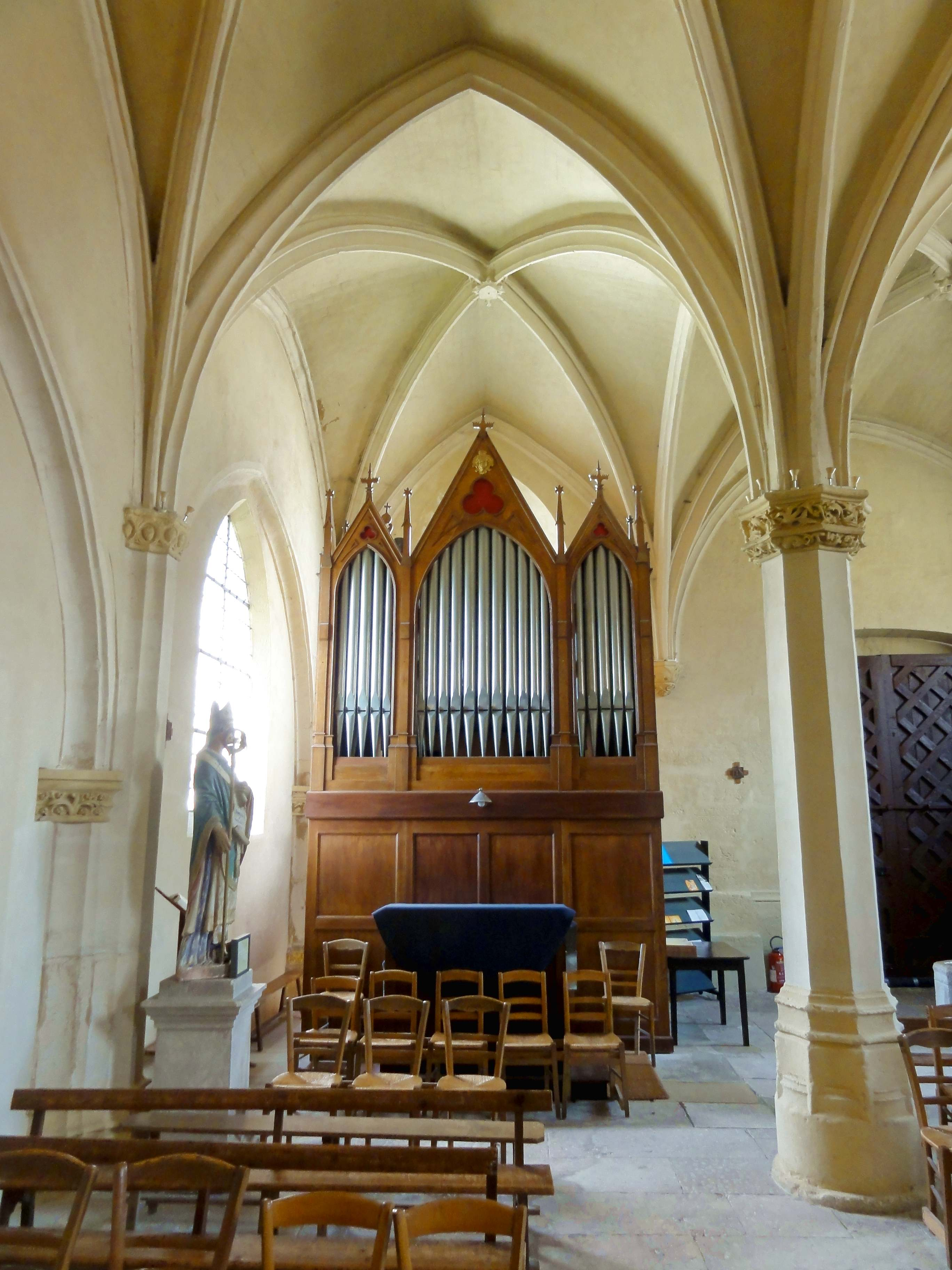 Intérieur de l'église - voir titre.